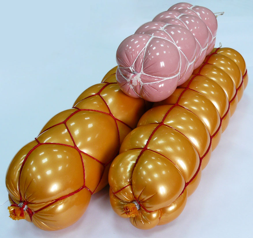 Колбаса "Докторская" в высокоэластичной пятислойной оболочке "Биолон".